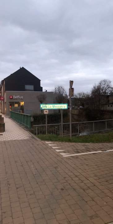 la Messancy riviere a athus en pays Dralon